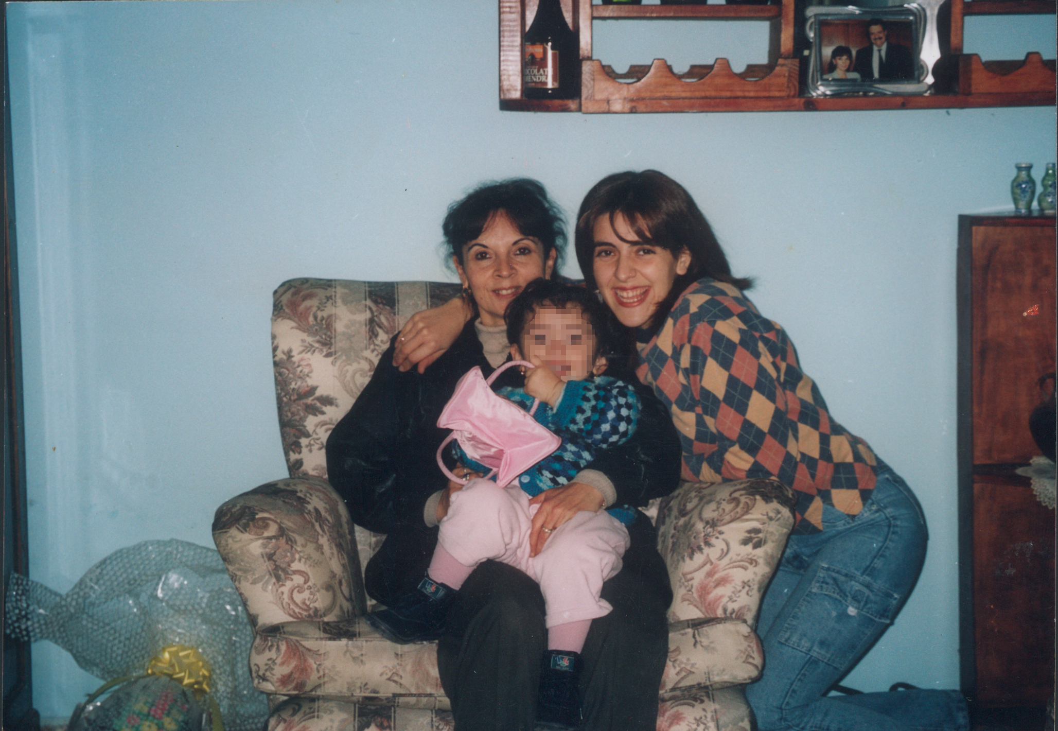 Marita Verón (derecha), su madre Susana Trimarco (izquierda) y la hija de Marita. Marita Verón fue secuestrada por tratantes de blancas en la provincia de Tucumán.